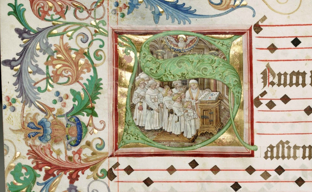 Graduál loucký (1499), strana 353: iniciála Sancti, premonstrátští řeholníci při společném zpěvu. Vědecká knihovna v Olomouci, signatura M IV 1